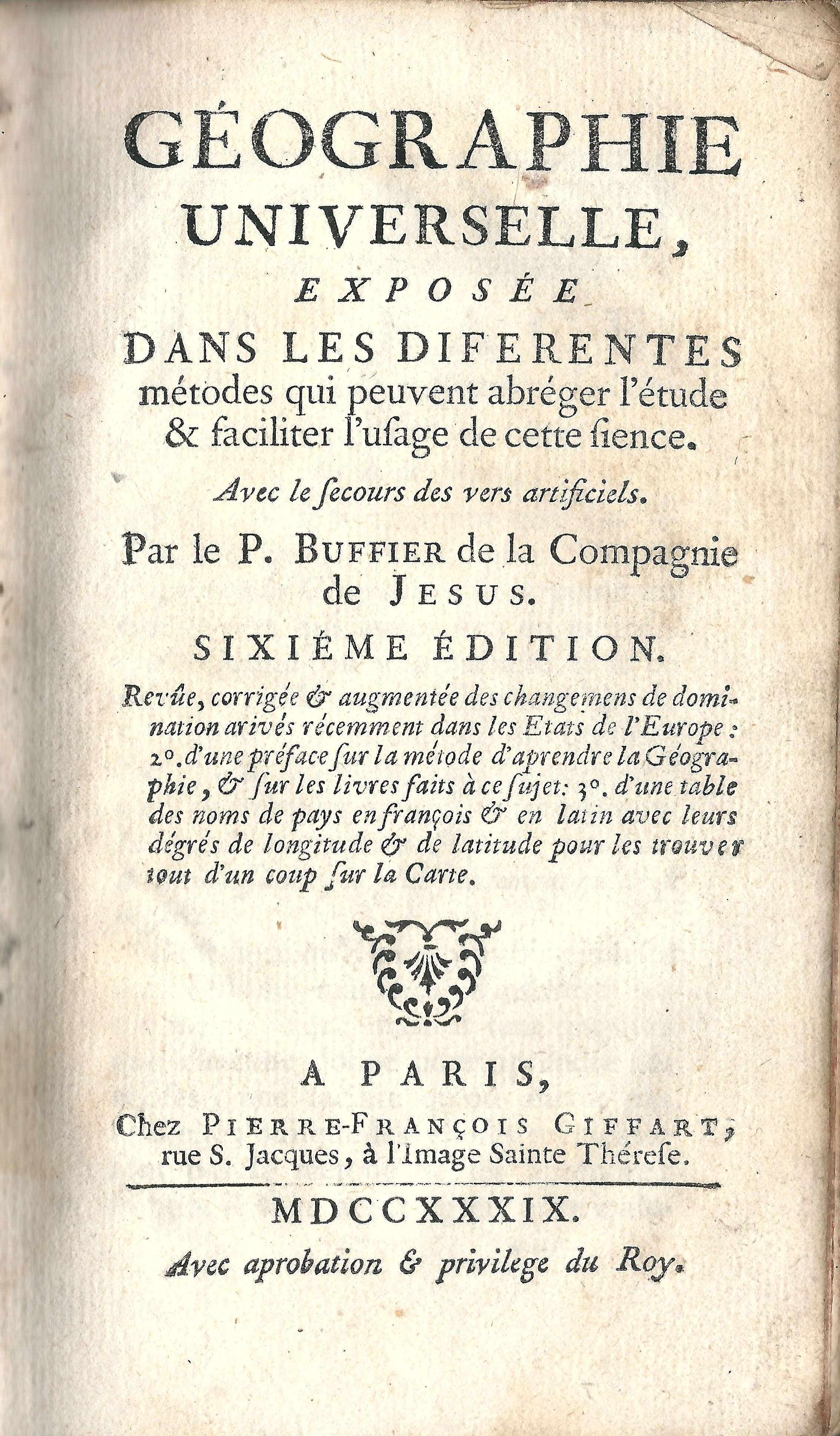 Géographie de Buffier : frontispice de l'ouvrage